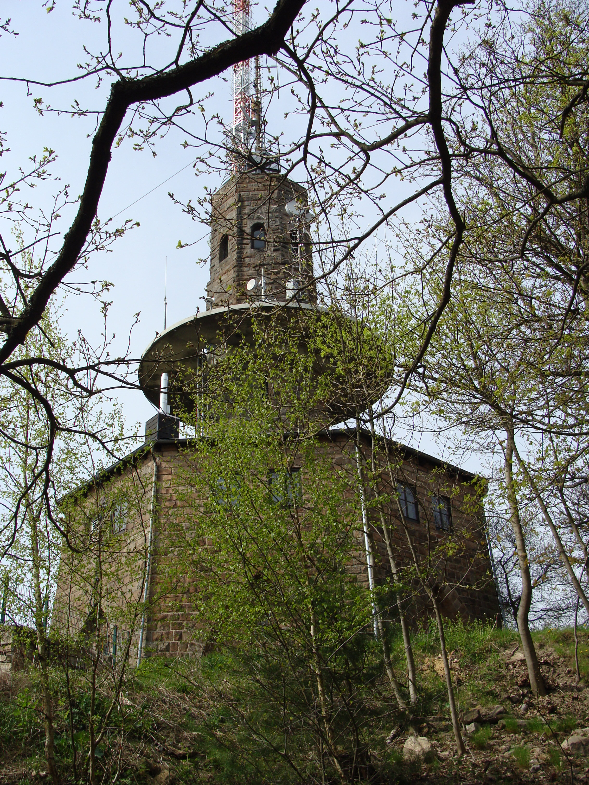 Der Weinbietturm auf dem Gipfel des Weinbiets im Pfälzer Wald